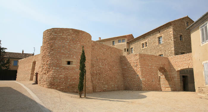 Village of Modène in Vaucluse, France